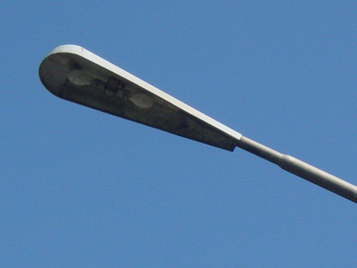 A fixture of a street light in Nijmegen genomen taken by myself in June 2006. --Santaarnpaal 1 jan 2007 14:50 (CET)